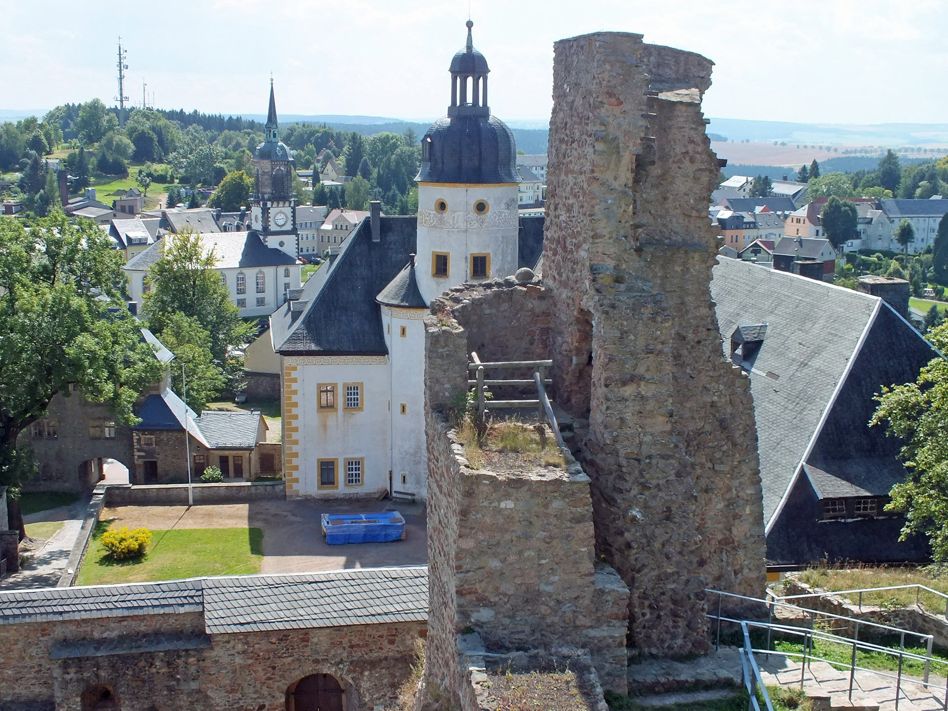 Schloss und Stadt Frauenstein vom Turm der Burgruine aus